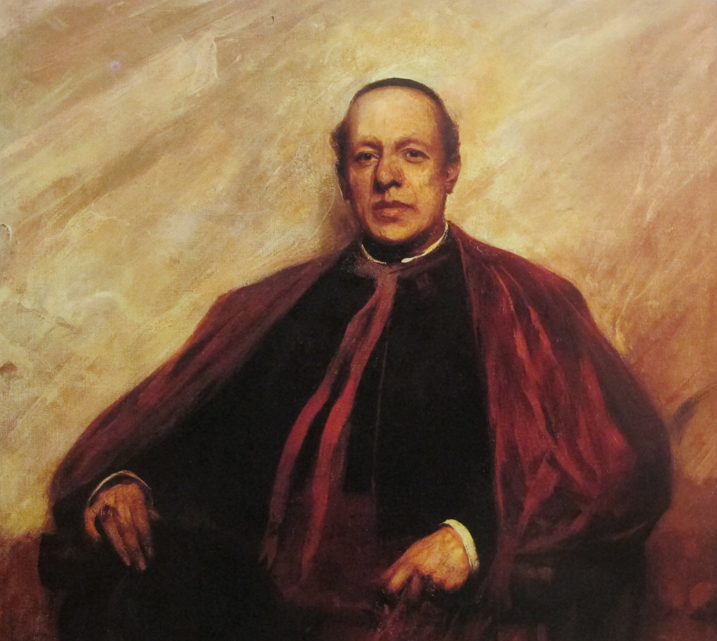 Cesare Tallone, Ritratto di carlo Brera, olio su tela, raccolte d'arte dell'Ospedale maggiore di Milano.